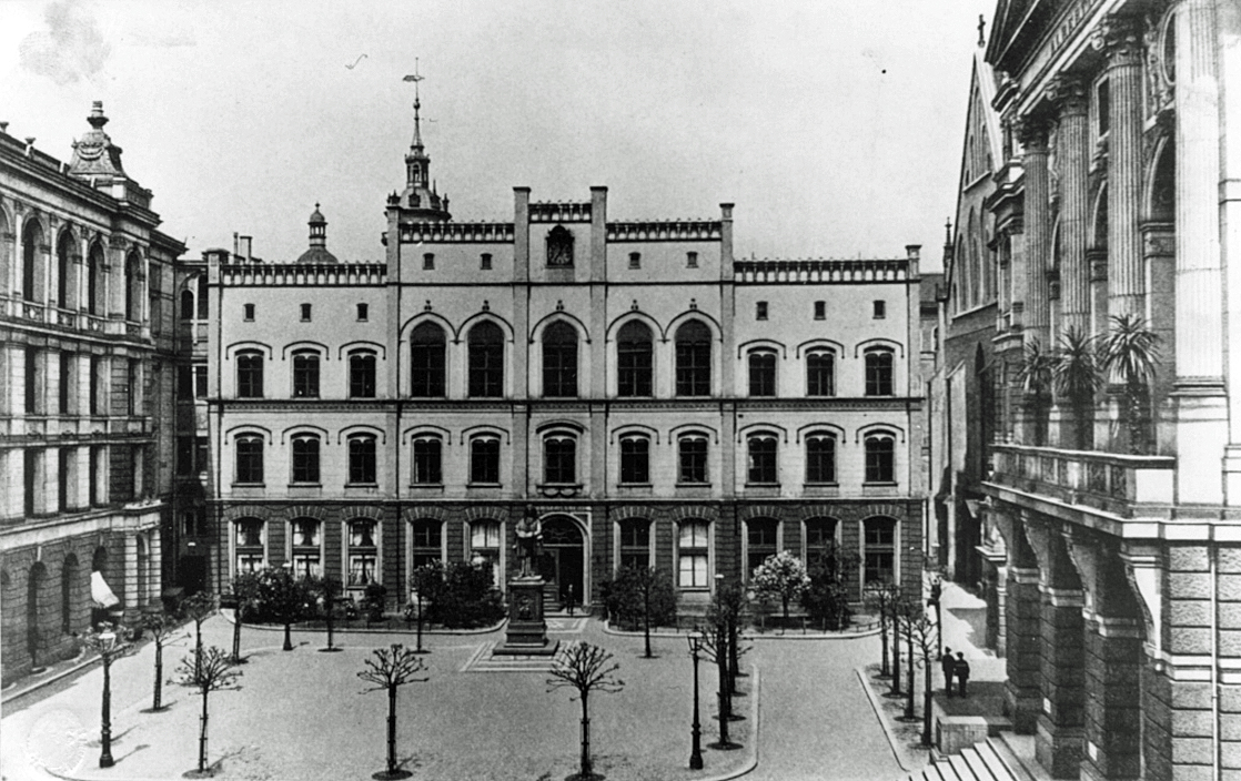 Das Bornerianum mit dem Leibnizdenkmal im Hof der Universität Leipzig